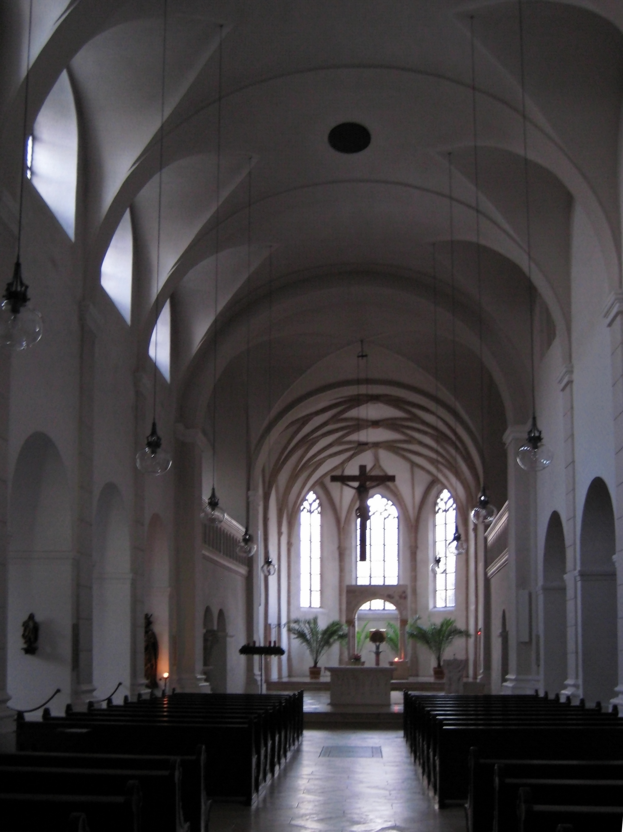 Innenraum der Kirche von Kloster Niedernburg in Passau